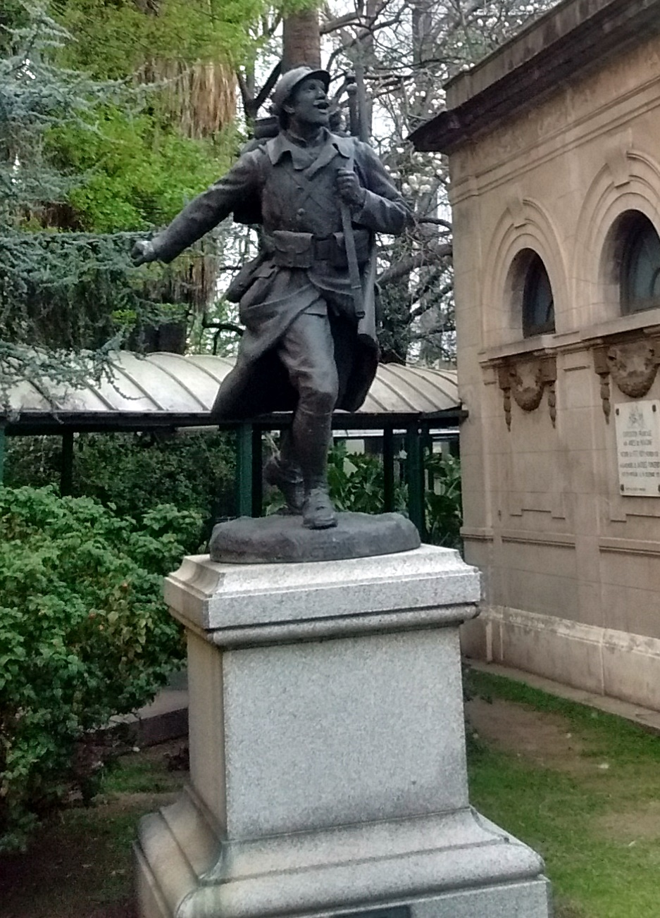 Estatua. con la expresión "Victoria cantando", de un soldado desconocido, en este caso un francés de la Primera Guerra Mundial, en el jardín del ex Hospital Francés, hoy Unidad Asistencial César Milstein. Barrio de San Cristobal, Buenos Aires, Argentina.